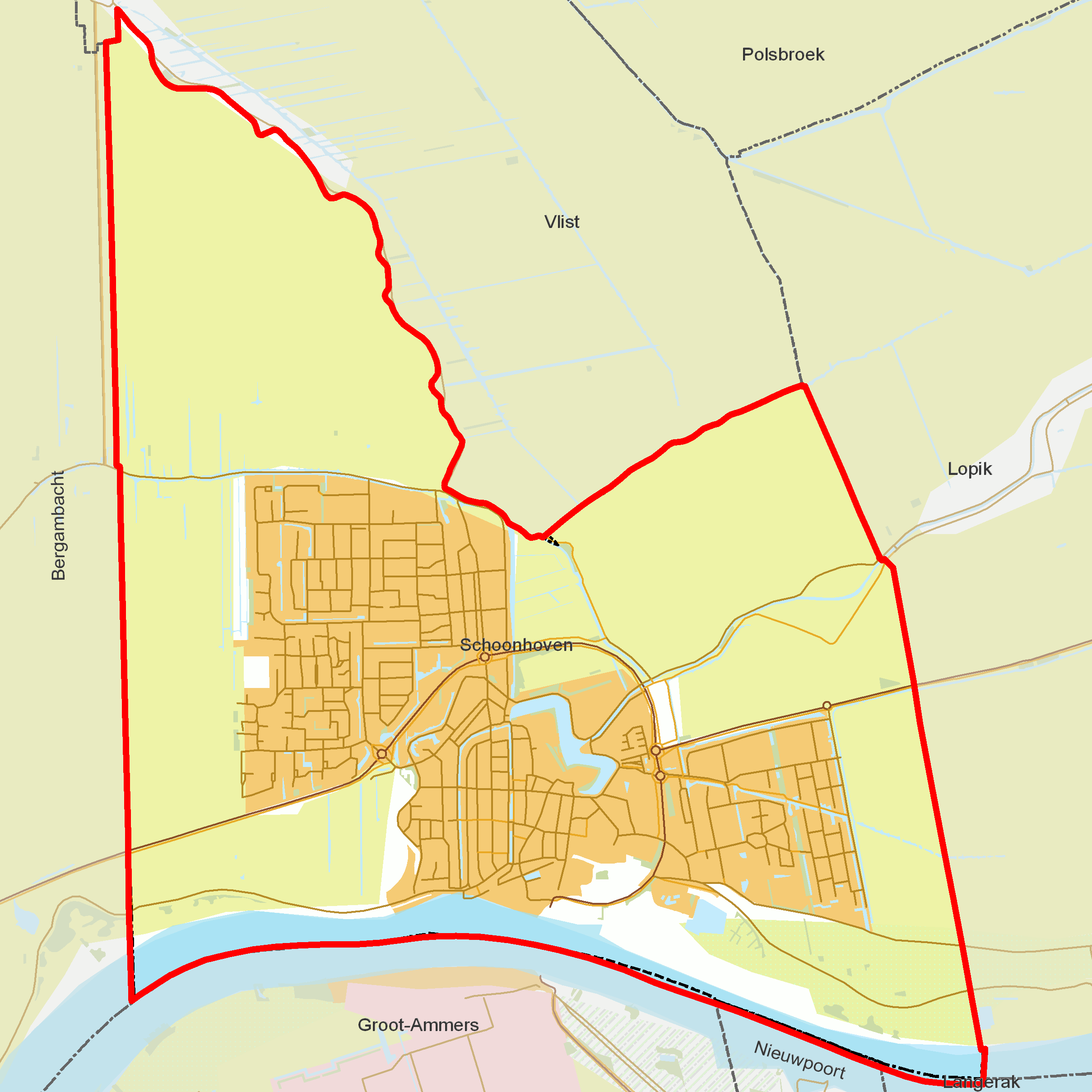 BAG woonplaatsen - Gemeente Schoonhoven.png